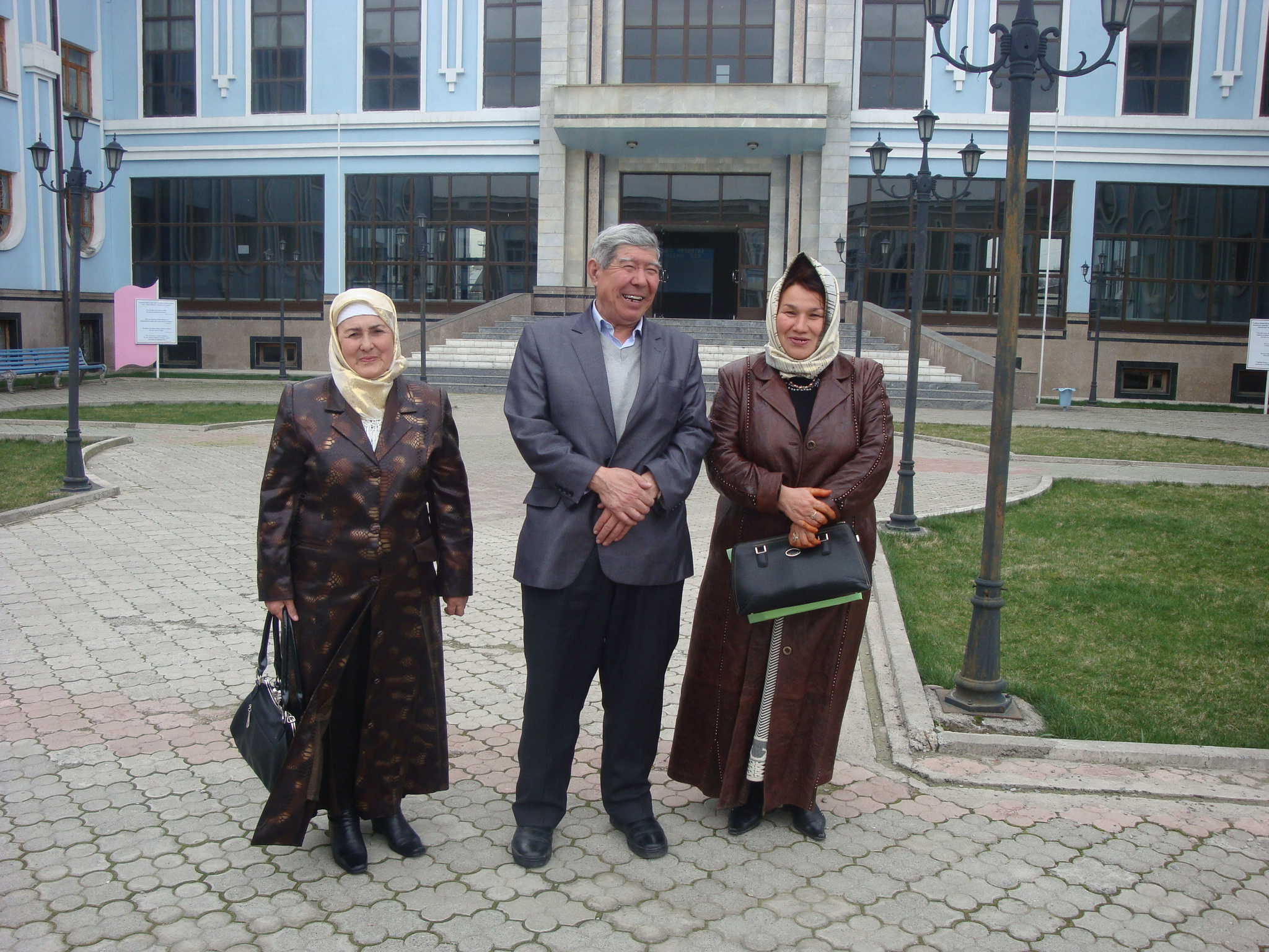 Oʻzbekcha/ўзбекча: 2010 may jalolobod